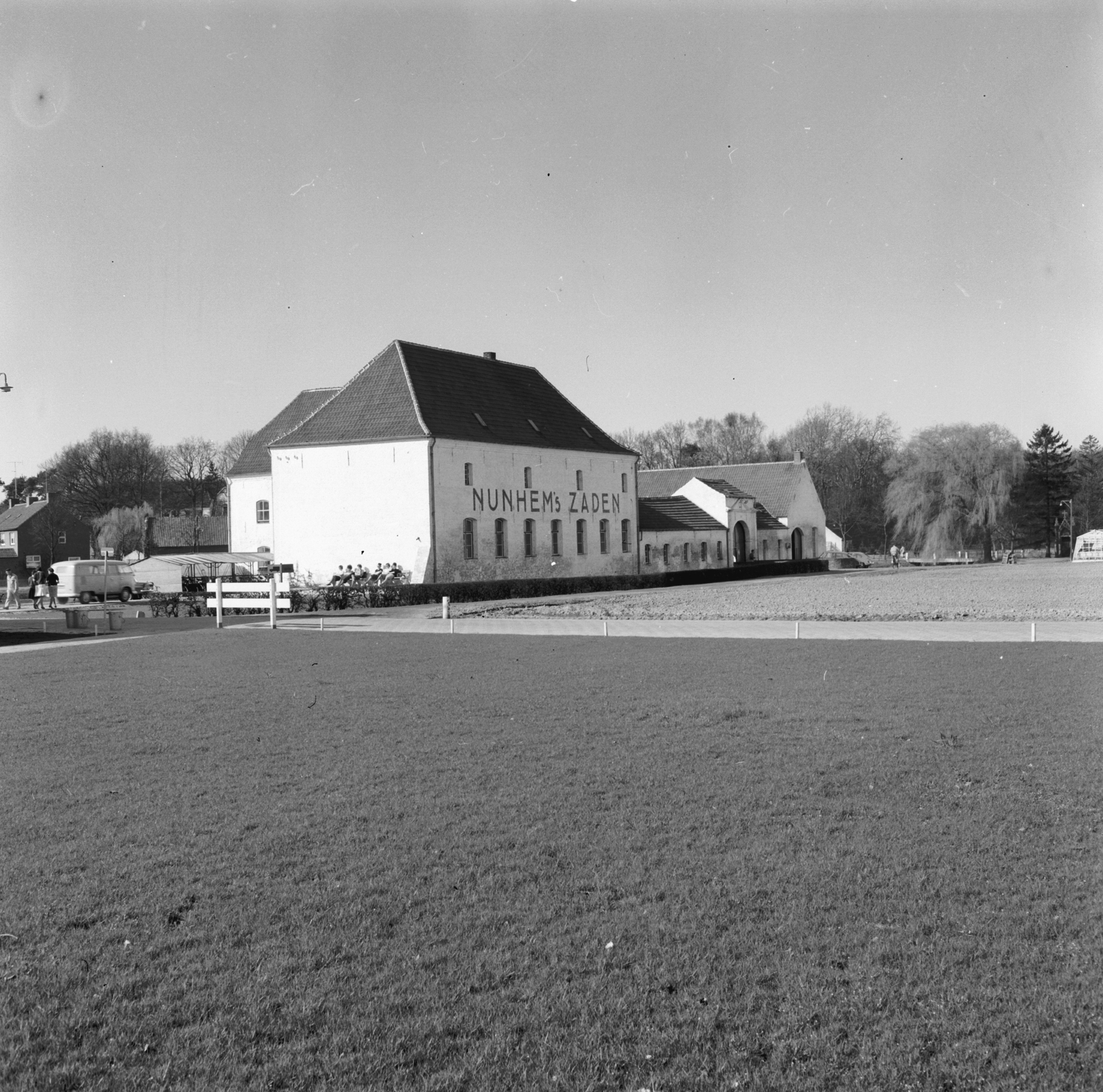 Voormalig Klooster Mariaschoot: aanzicht